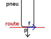 schéma simple des forces entre le pneu et la route